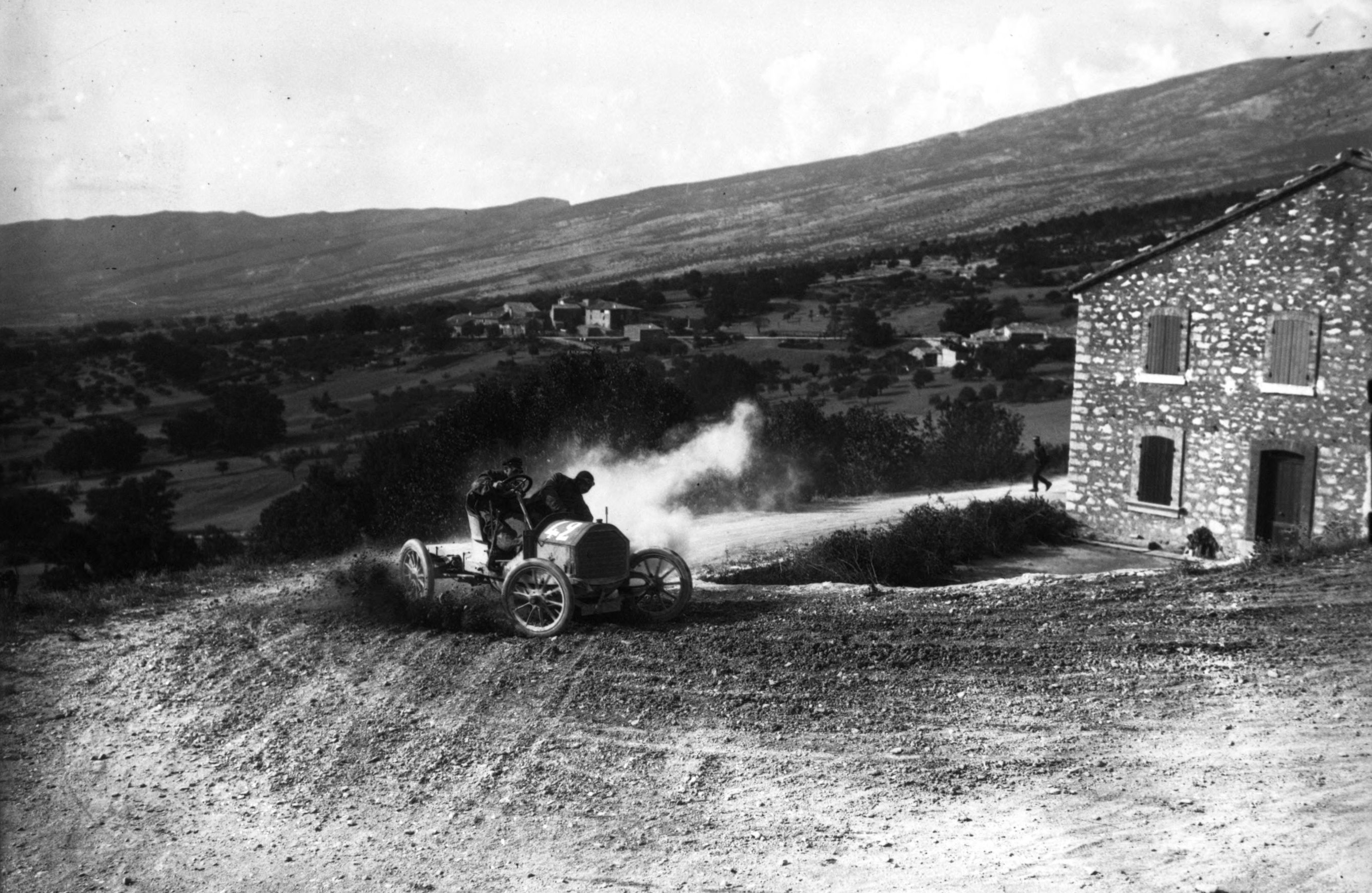 Monsieur Mottard sur une voiture La Buire lors d'une course au Mont Ventoux